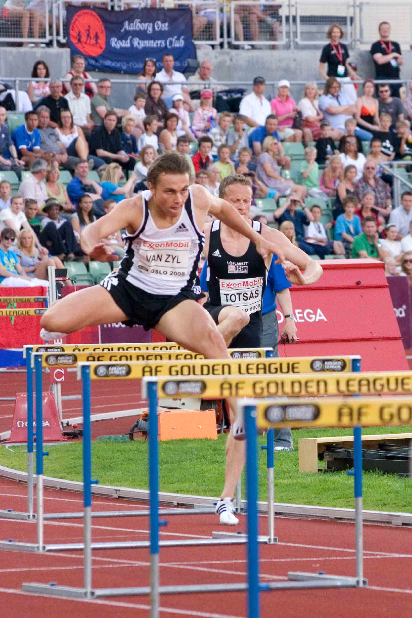 L. J. van Zyl during Exxon Mobil ÅF Golden League Bislett Games 2008